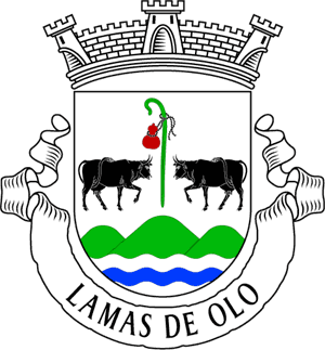 Brasão da freguesia de Lamas de Olo (concelho de Vila Real)